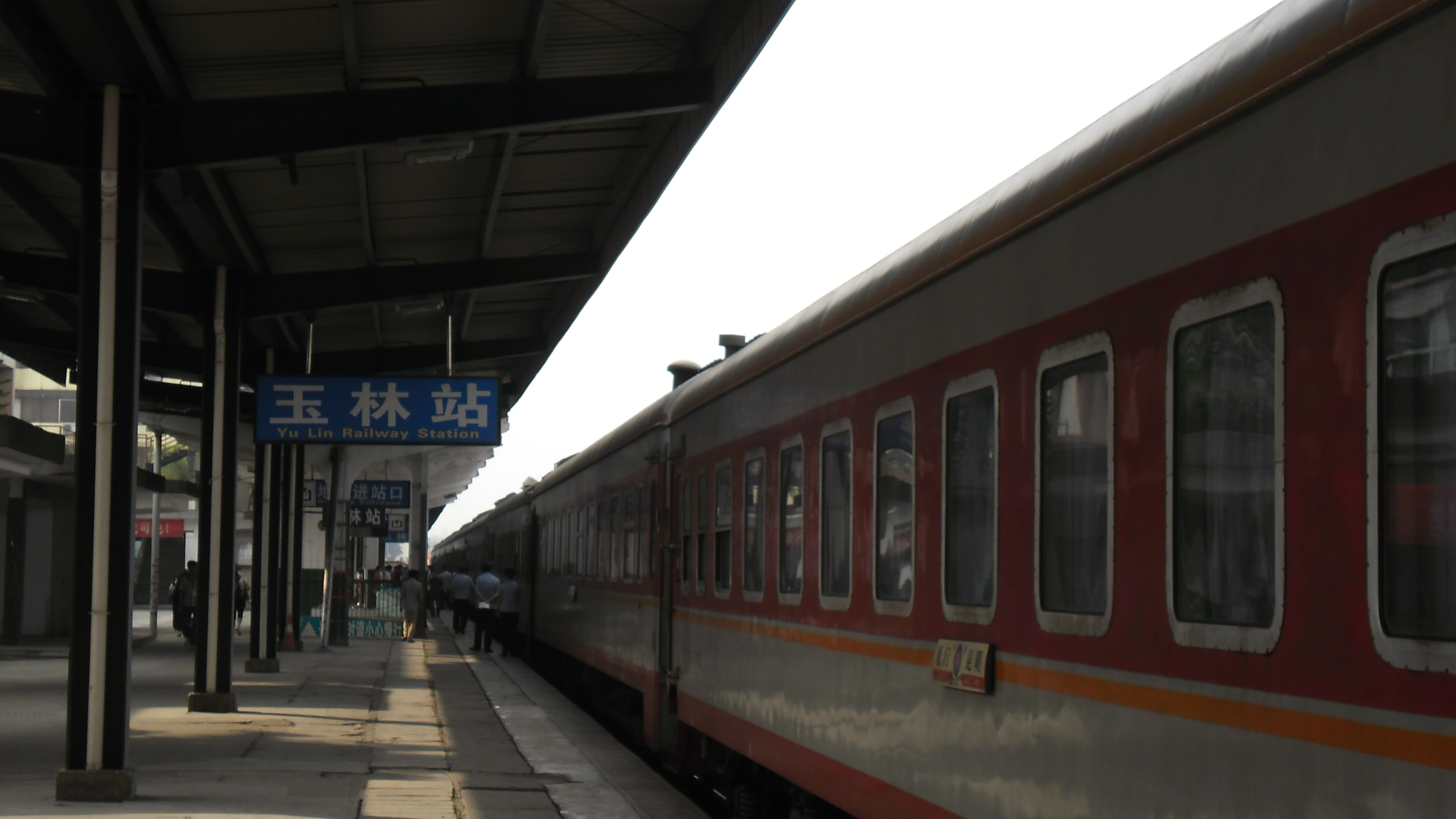 中文（中国大陆）: 2011年的玉林站站台与昆明至厦门的K229次列车。